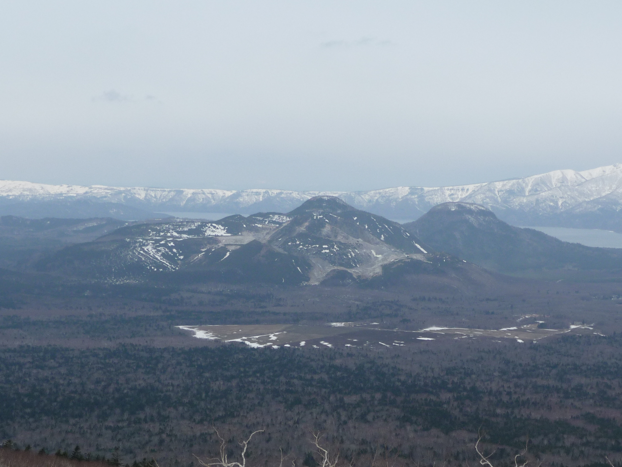 弟子屈町摩周第3展望台から見たアトサヌプリ